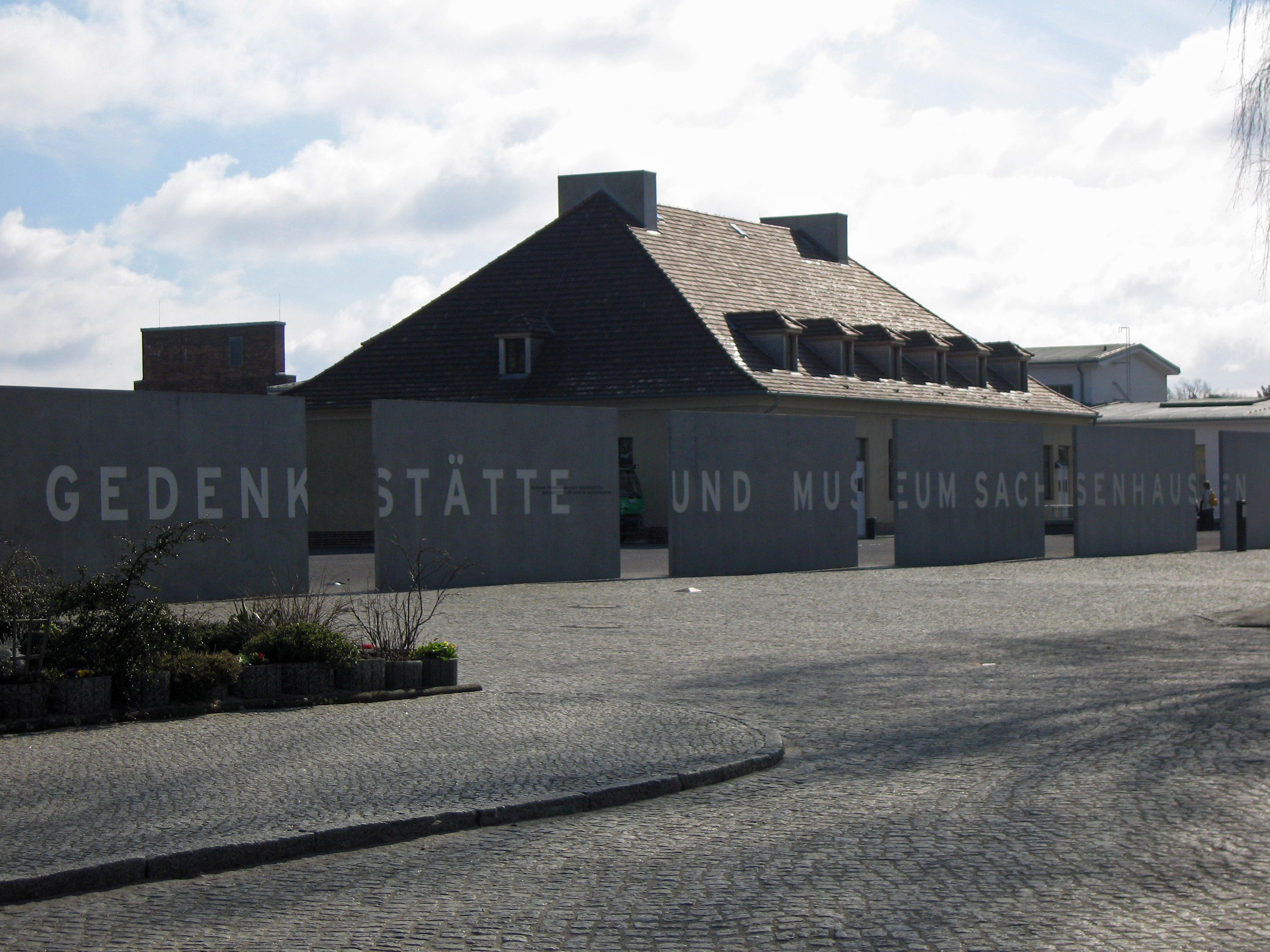 Sachsenhausen_1